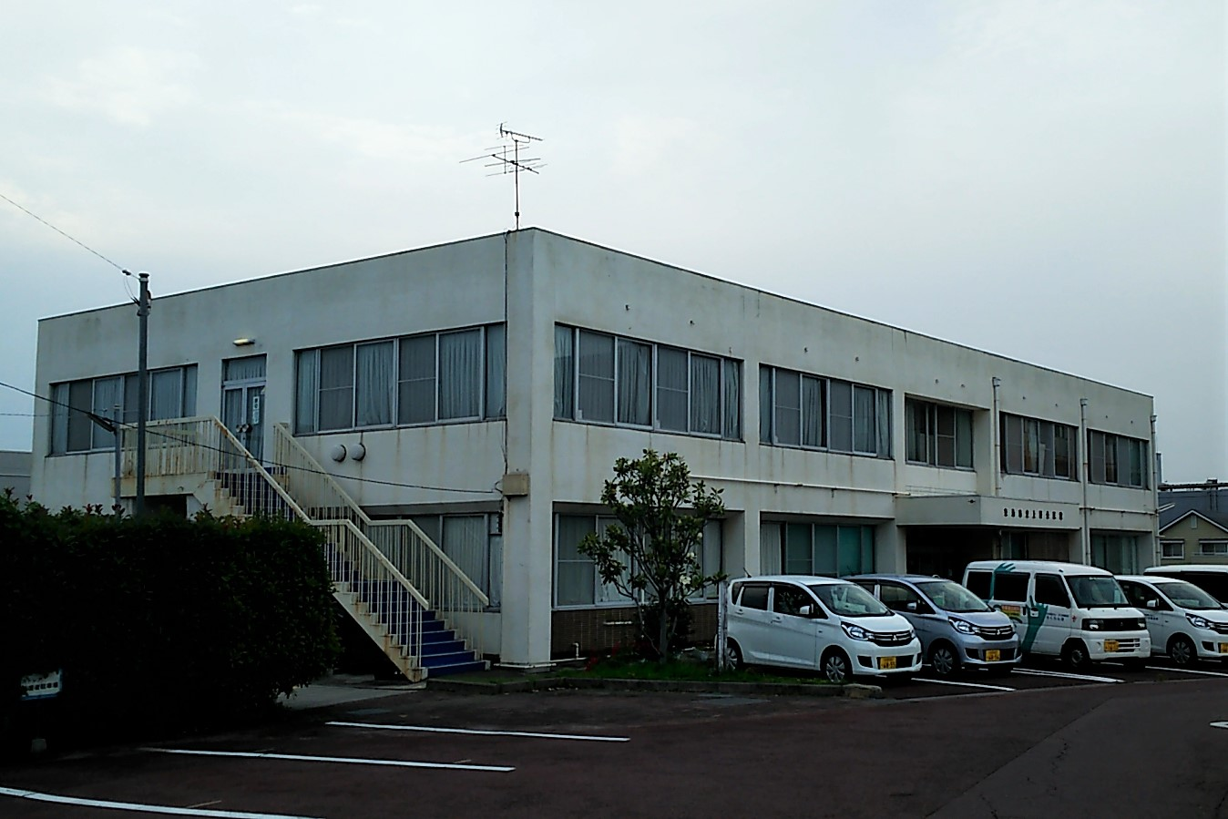 愛知県東海市にある東海市立上野公民館。